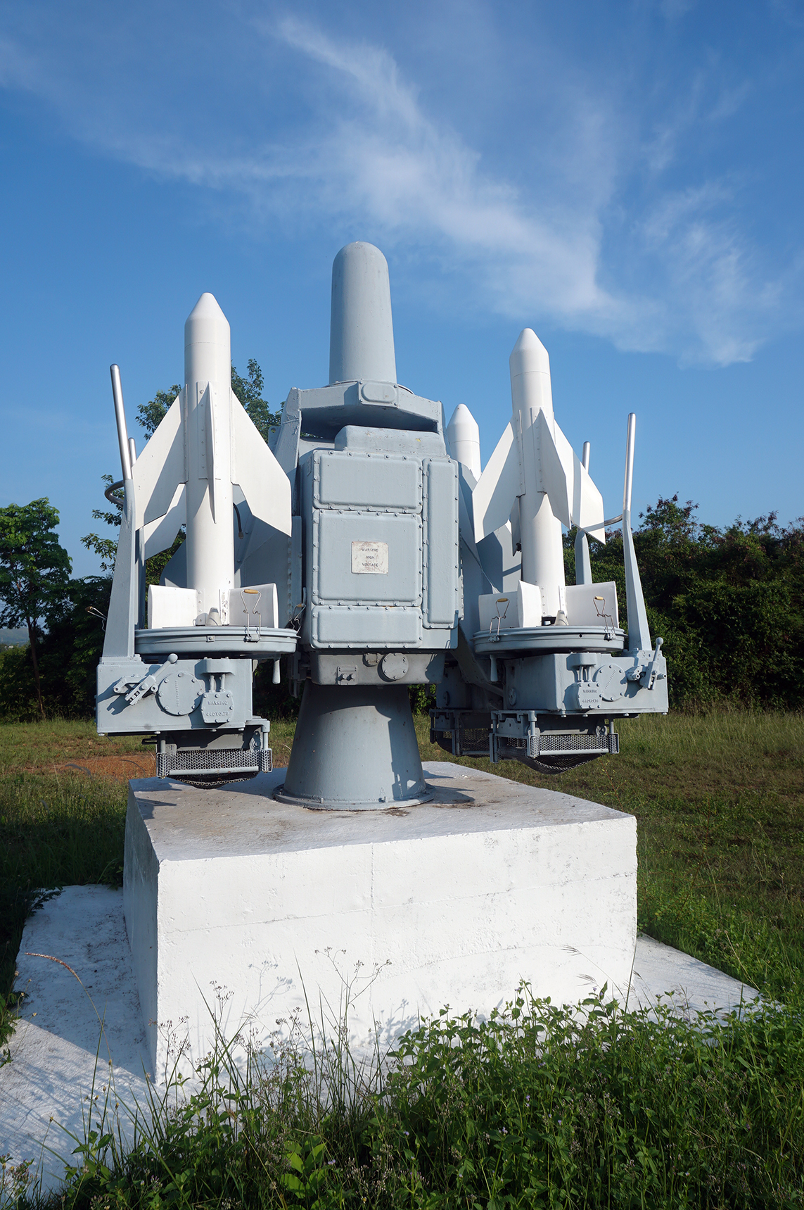 กองอาวุธปล่อยนำวิถี กรมสรรพาวุธทหารเรือ